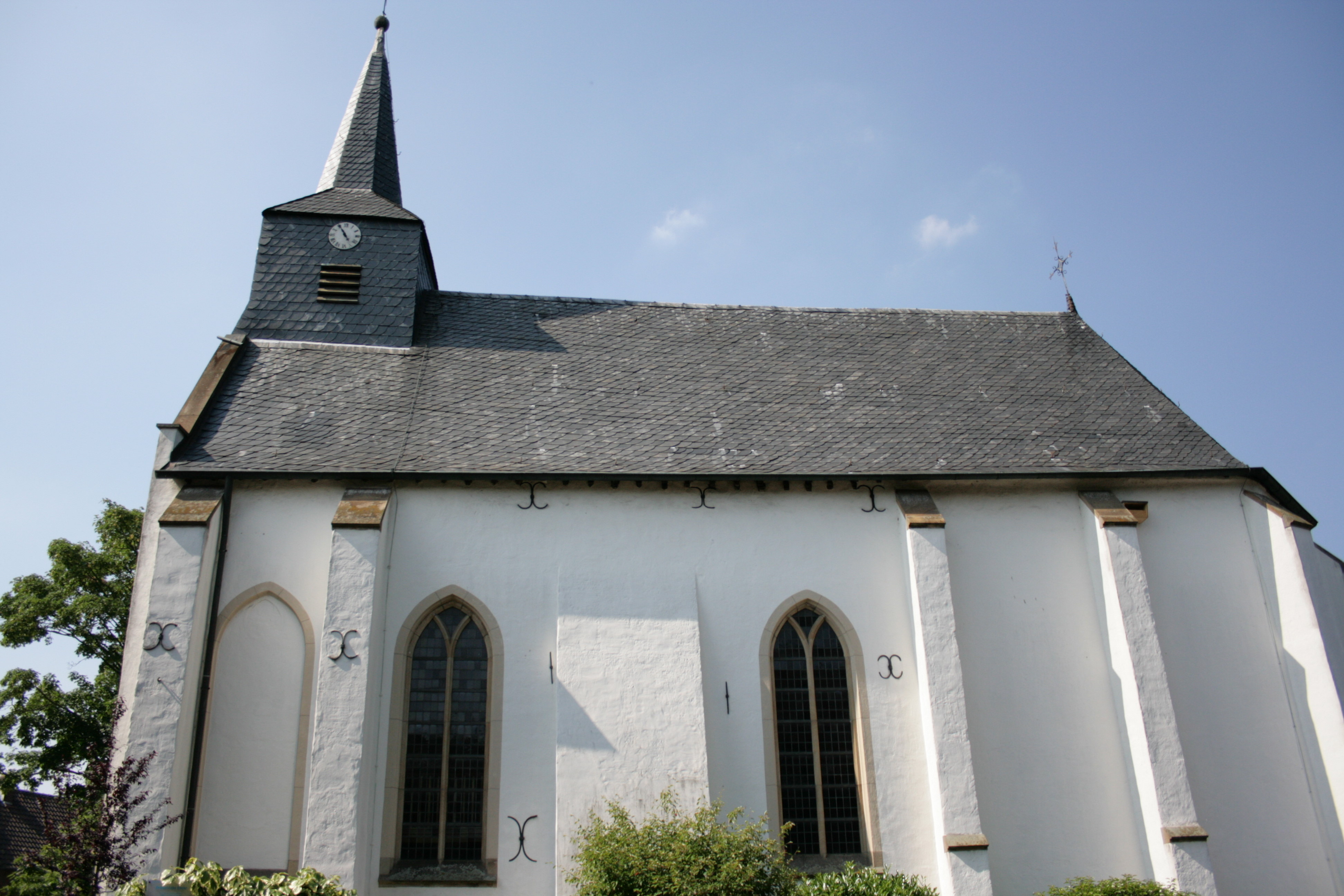 Evangelische Kirche an der Binnenstraße in Werth, Isselburg